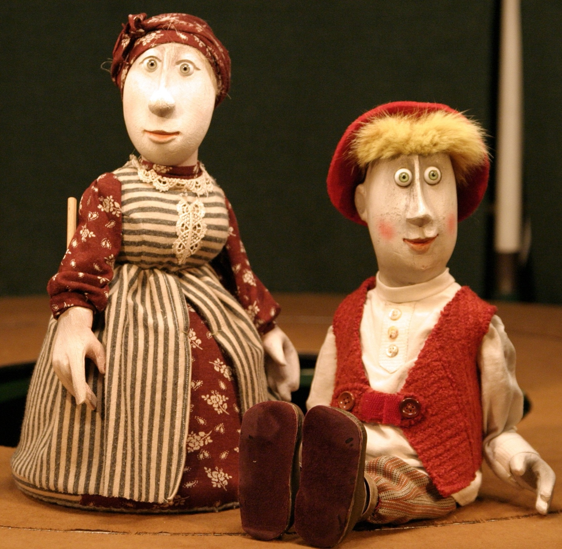 Puppentheater Rosi Lampe: Zwei Figuren aus dem Stück "Hans im Glück" für Kinder und Familien